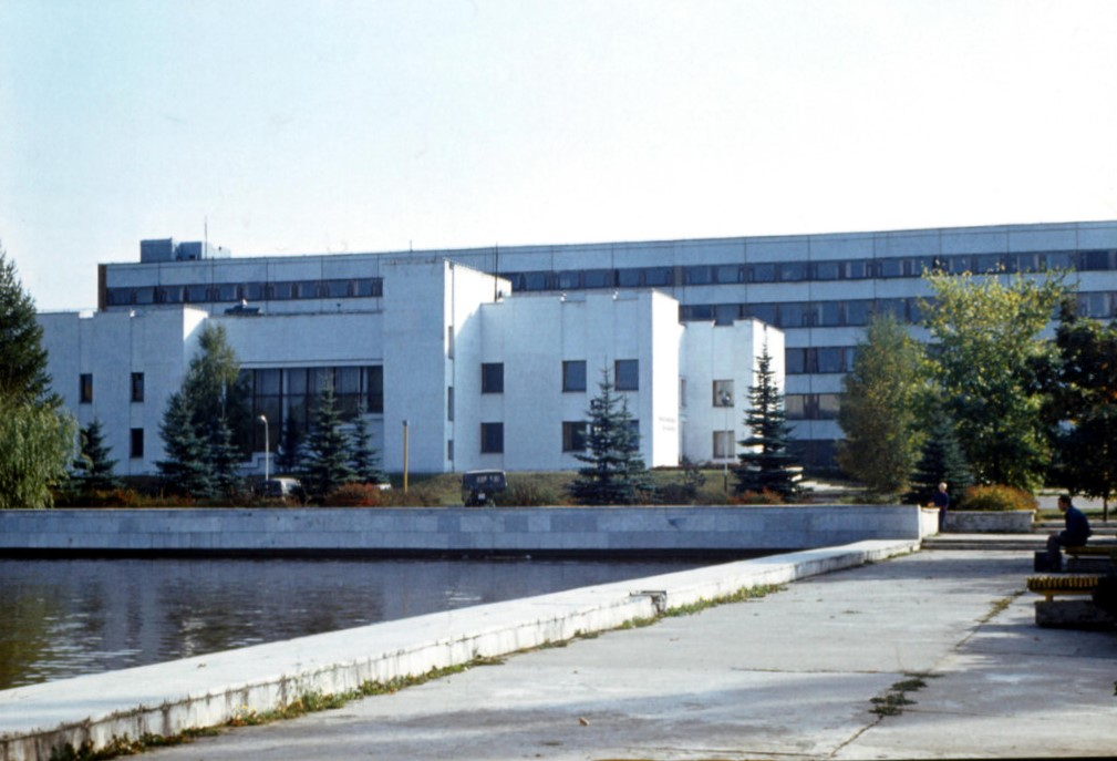 Институт Белка Пущино